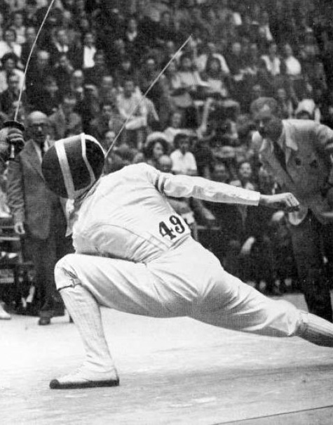 Christian d'Oriola, lors des JO de Londres en 1948.